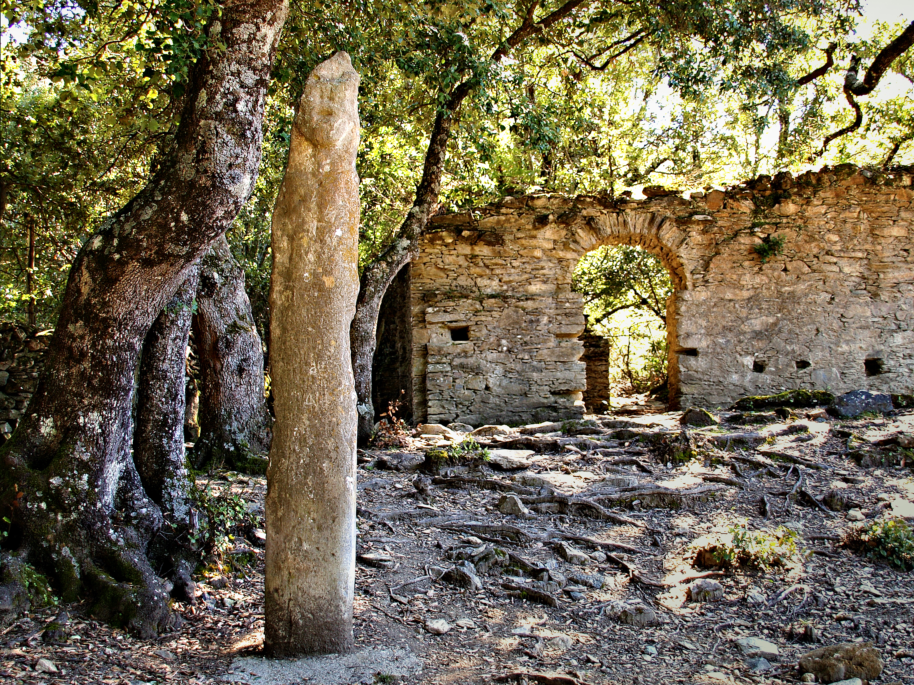 Cambia - Statue-menhir de Petra Frigiata